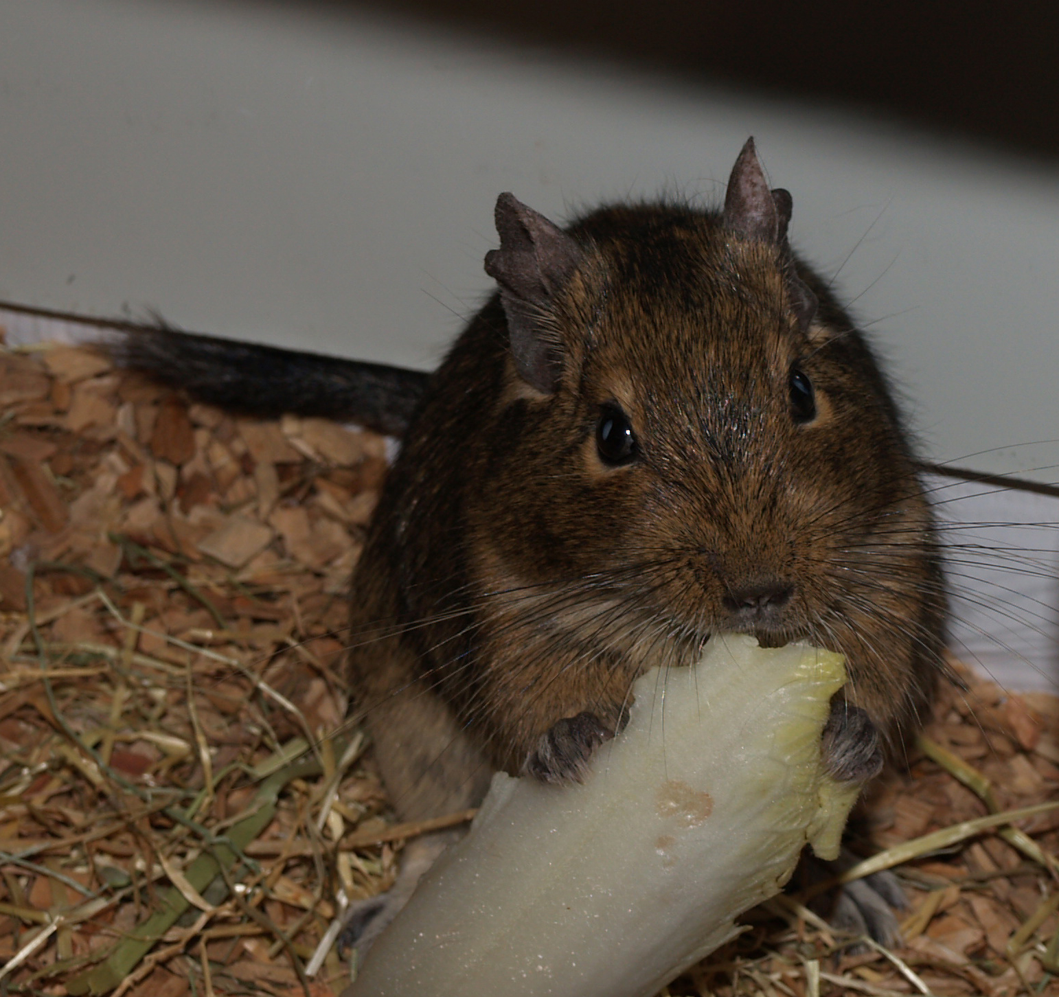 Degoe/Degu/Degú met witlofblaadje – Een wildkleurige degoe